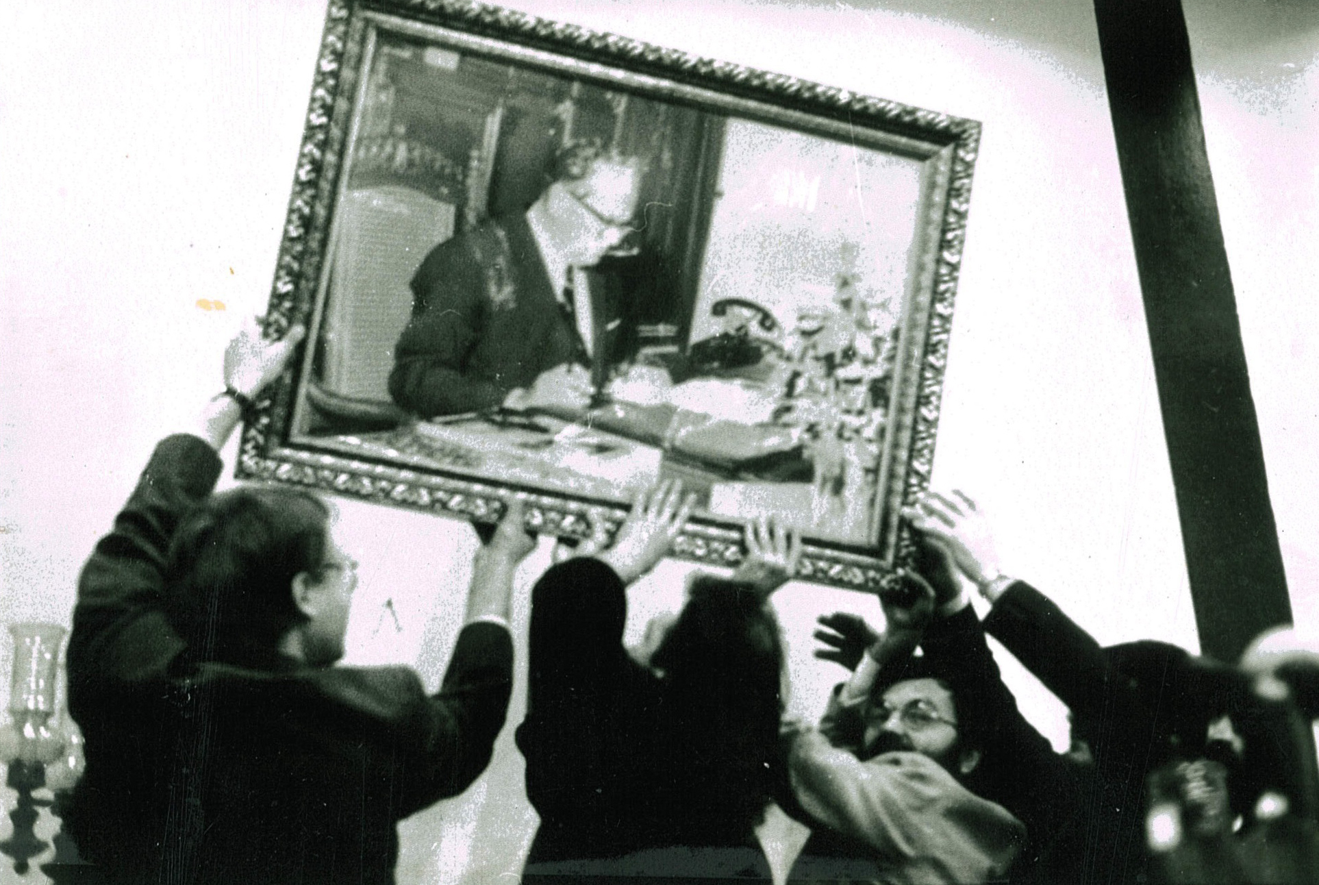 Скидање Титове слике